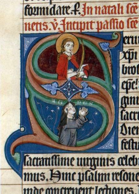 Sv. Anežky